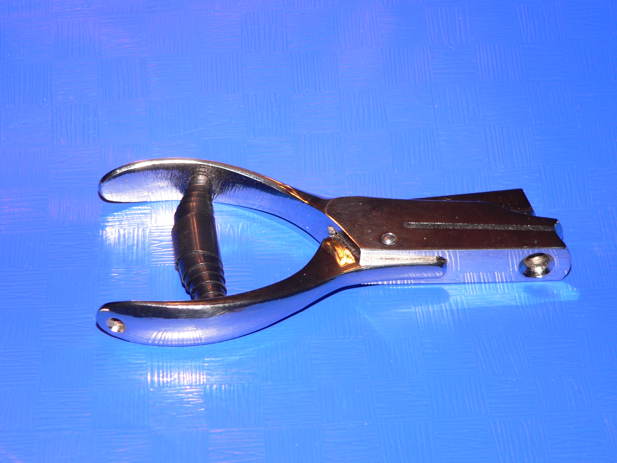 Schaffnerzange - Control Nippers